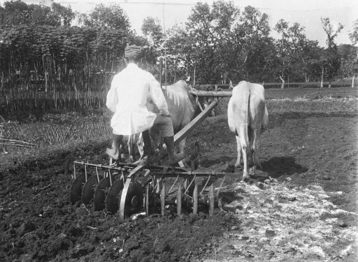 Foto. Het ploegen/eggen van een akker met een span runderen